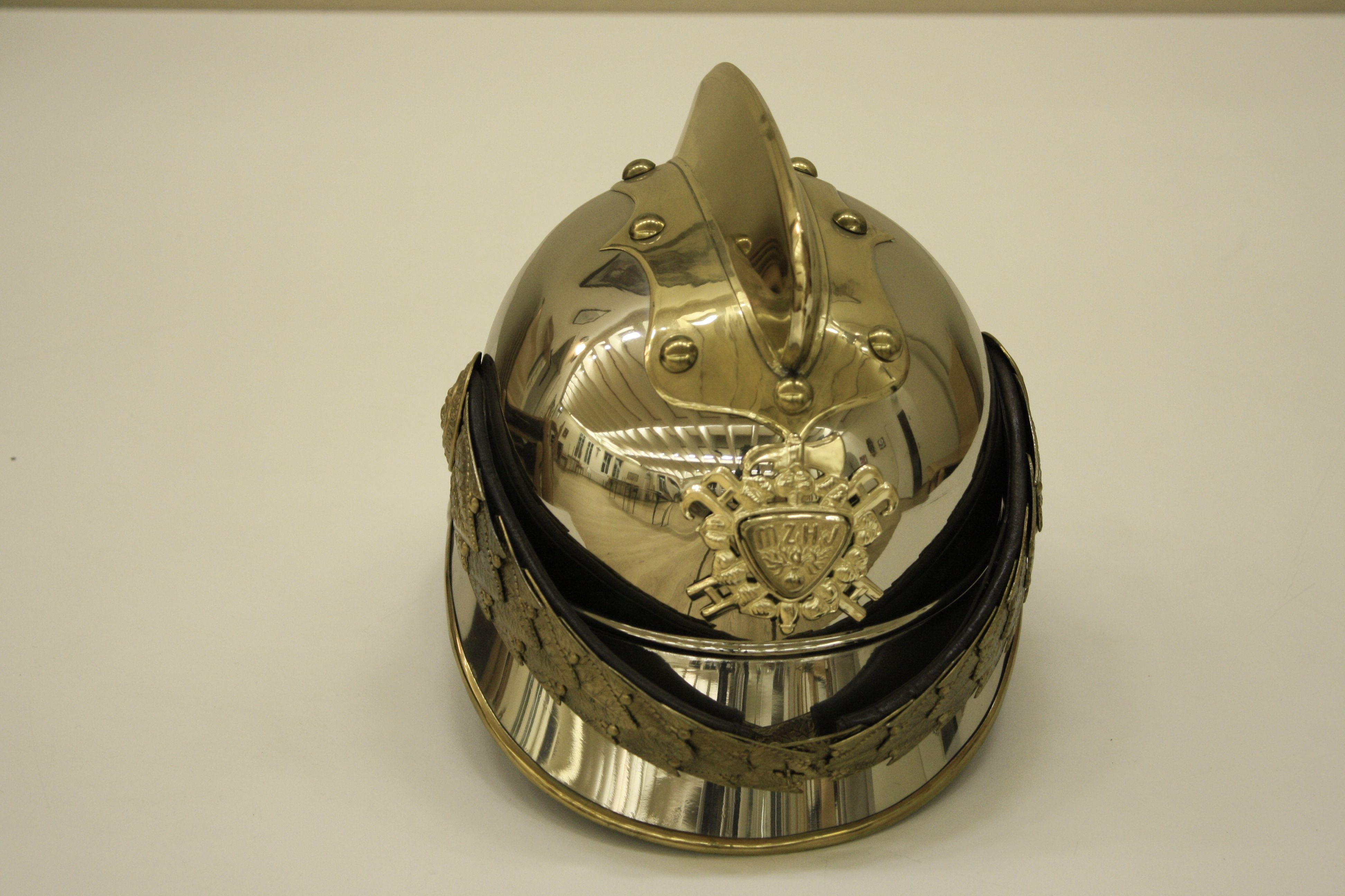 Tschechischer Feuerwehrhelm (Kommandant) von ca. 1890 im Feuerwehrmuseum Perchtoldsdorf in Niederösterreich